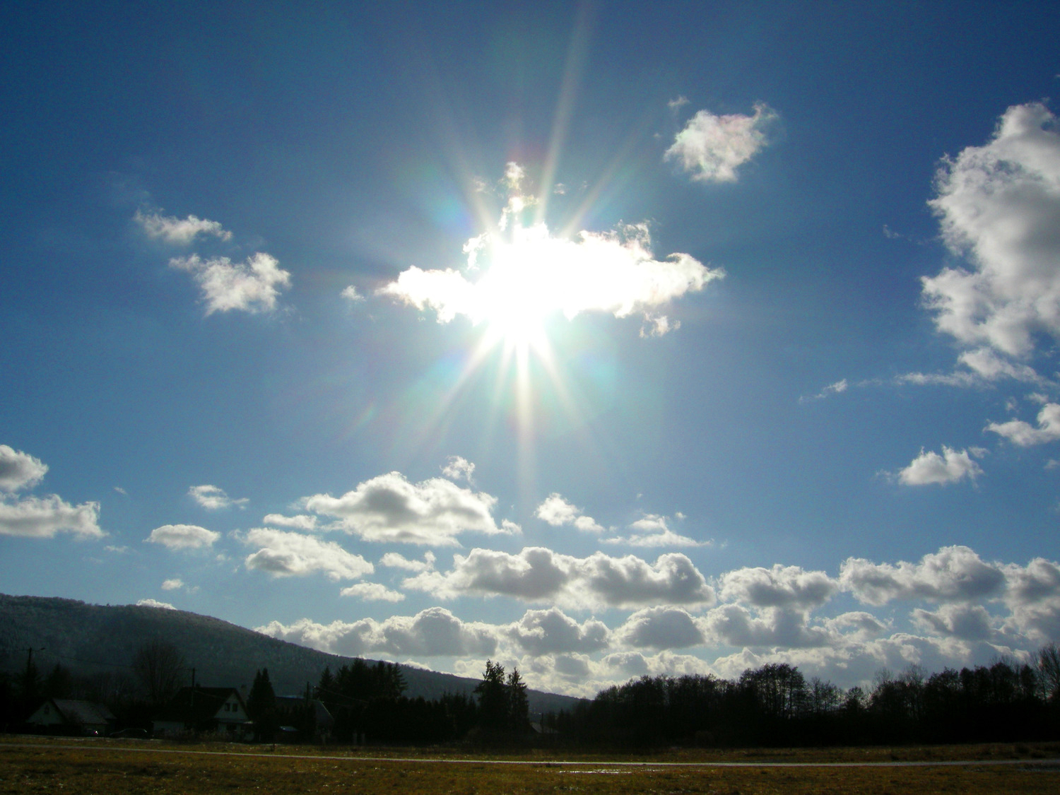 Soleil à travers un nuage sur fond de cumulus humilis de beau temps.